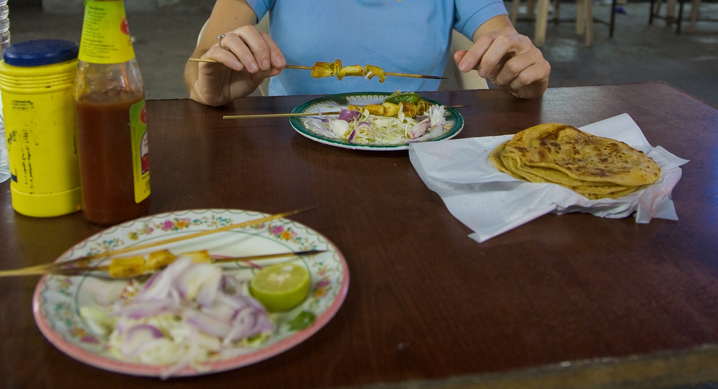 Squid Kebab, Seeb, Oman